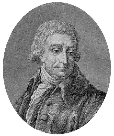 Christian Gottlob Heyne. Stich von F. Müller